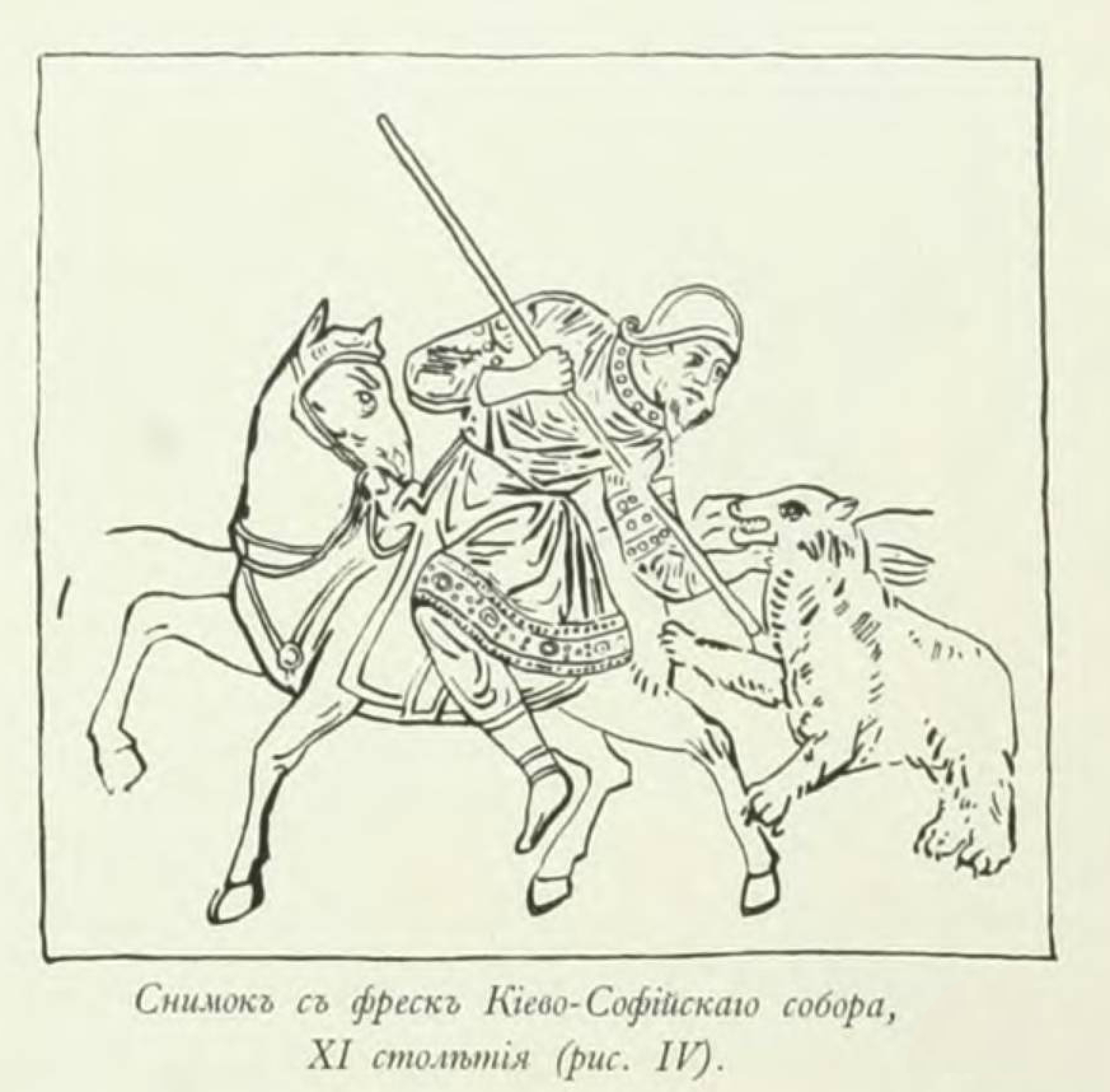 Великокняжеская, царская и императорская охота на Руси